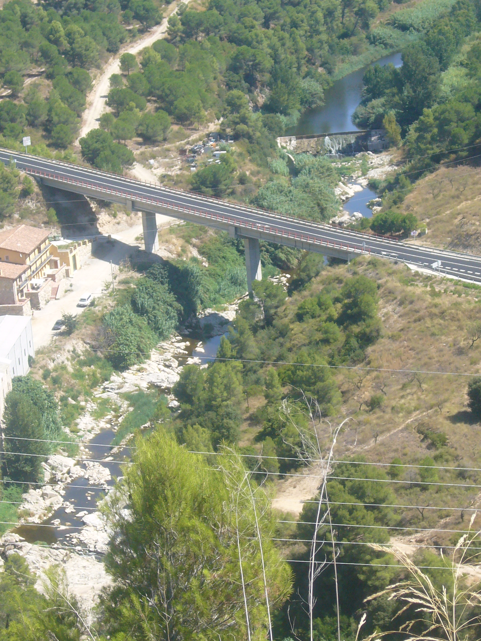 Riu Anoia vist des del castell de Cabrera. Viaducte de la carretera C-15. A l'esquerra de la imatge Cal Bóta o Can Bota (en origen va ser un molí fariner, posteriorment una fàbrica de mantes i encara més tard una fàbrica de filats que va subsistir fins el 1956), al terme municipal de Cabrera d'Anoia. A la dreta de la imatge, terme de Vallbona d'Anoia.